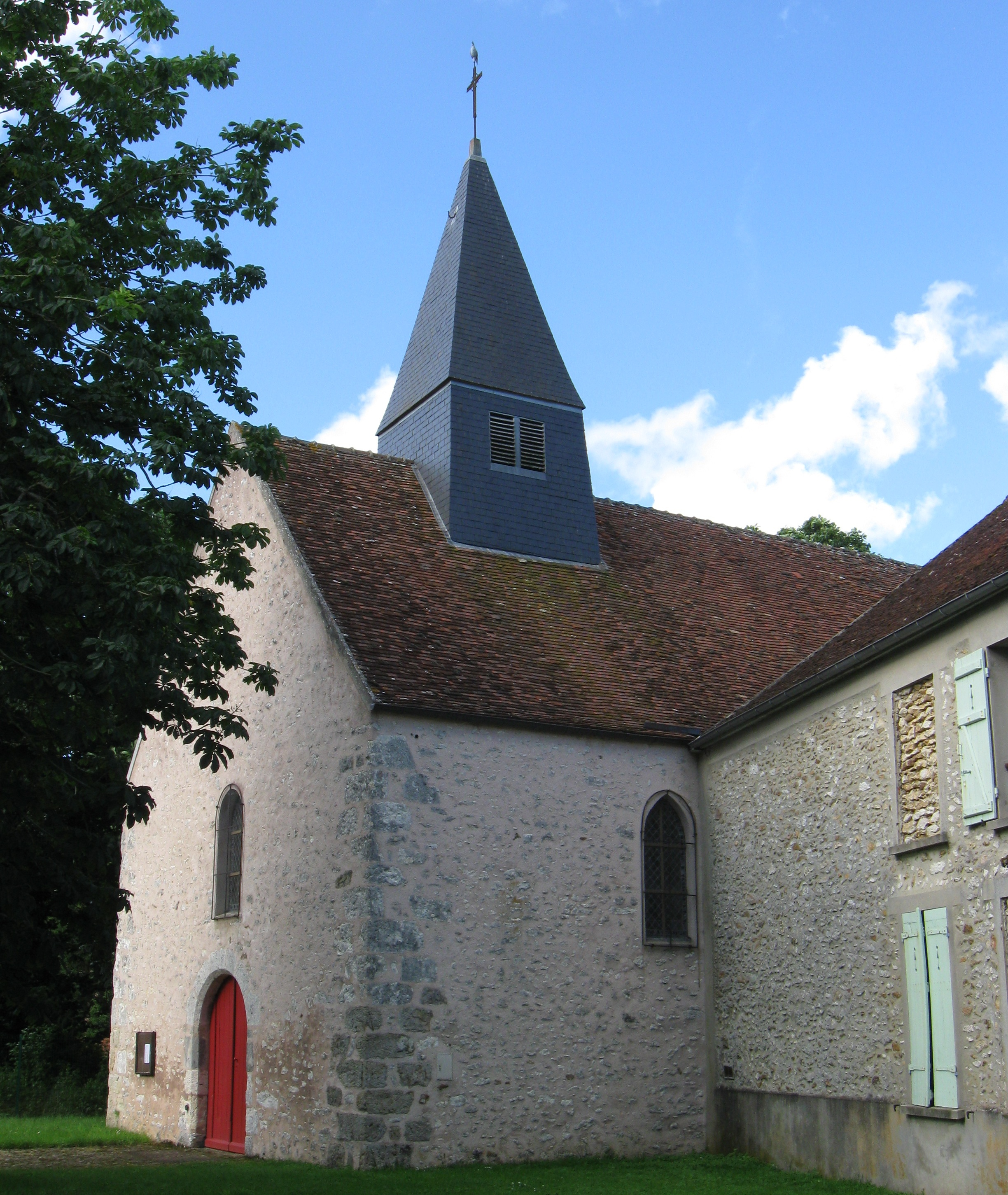 Église Saint-Germain-et-Saint-Blaise de Frétoy. (Seine-et-Marne, région Île-de-France).